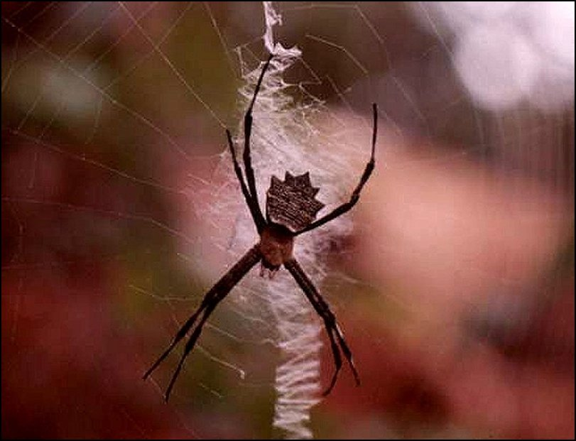 Argiope flavipalpis sur sa toile à grand stabilimentum dans la forêt camerounaise